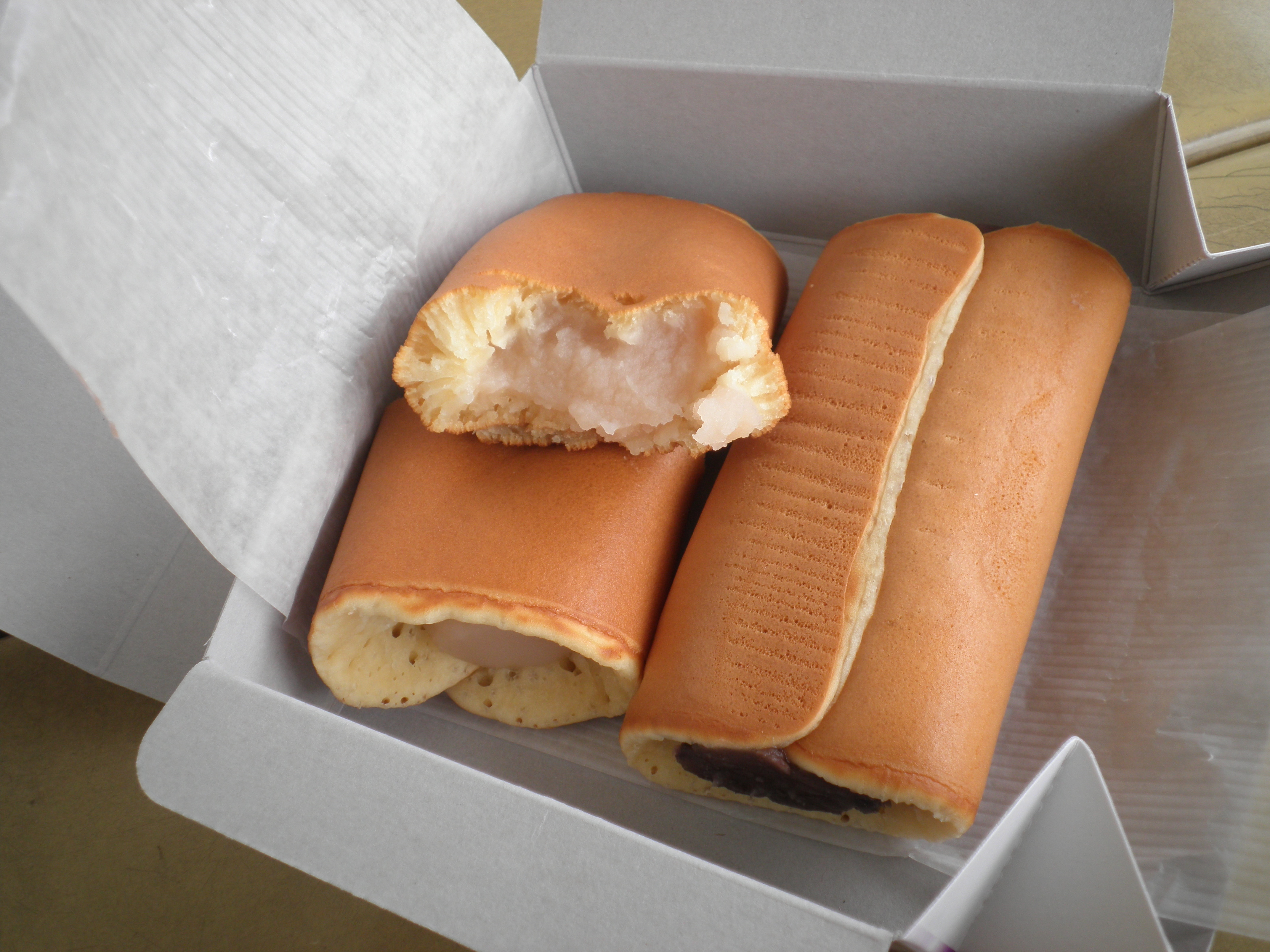 名鉄知立駅改札内の藤田屋知立駅店で購入したあんまき。左が白あんで右が黒あん。右は裏を上にして置いて撮影した。